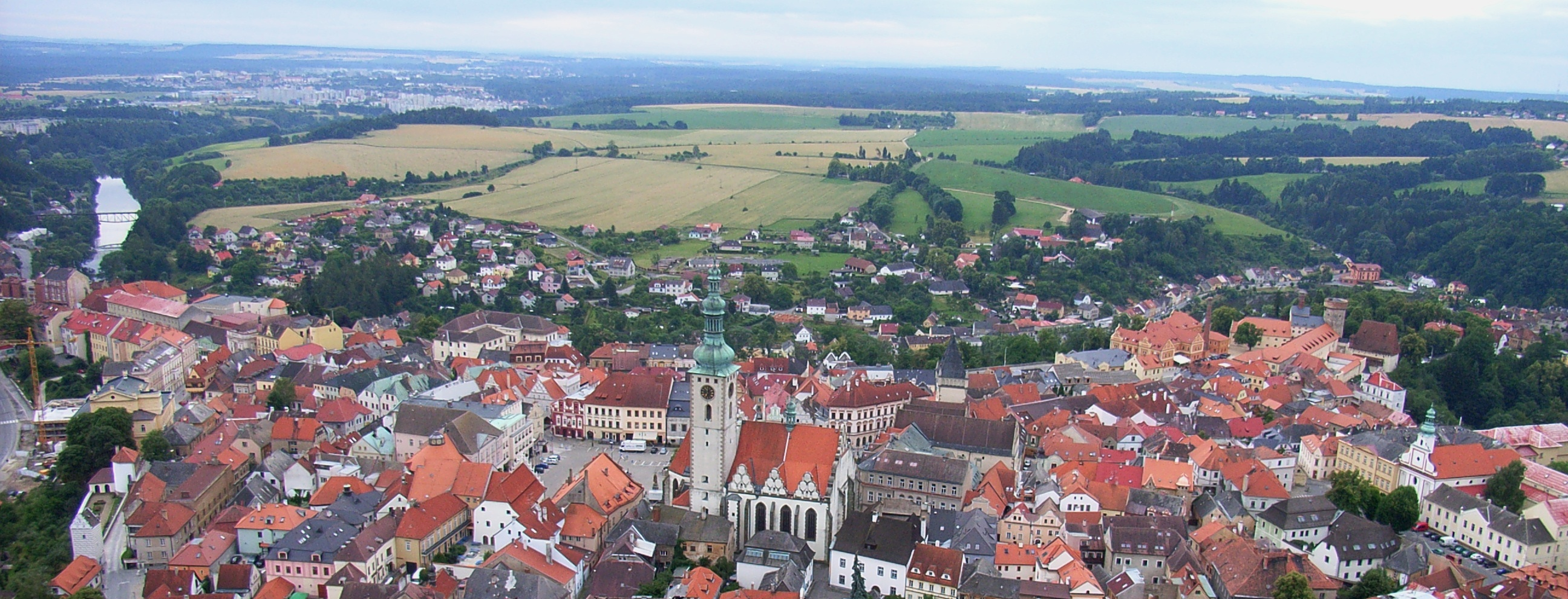 Česky: Tábor-místní část Čelkovice (vlevo za řekou)